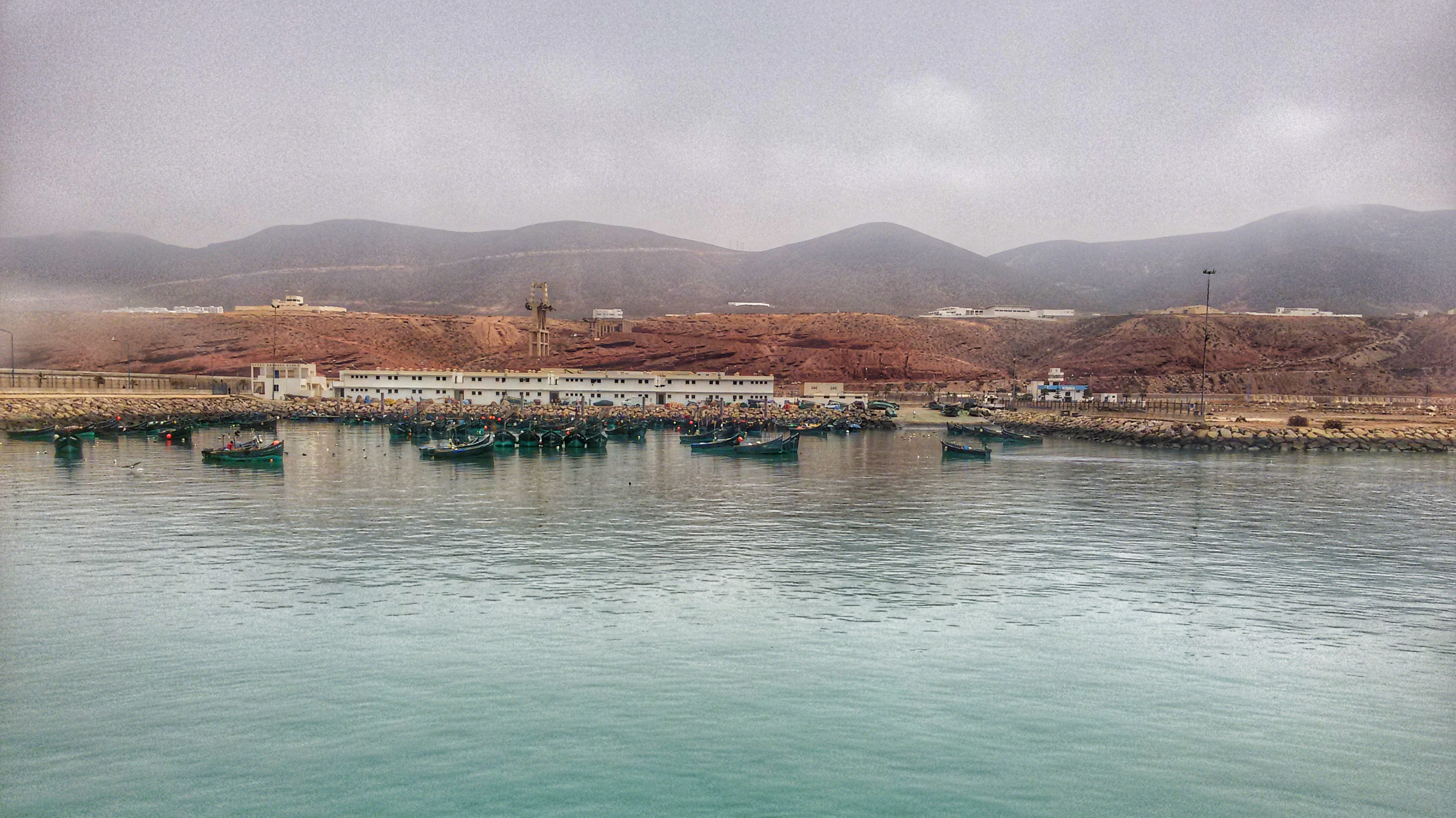 Summer